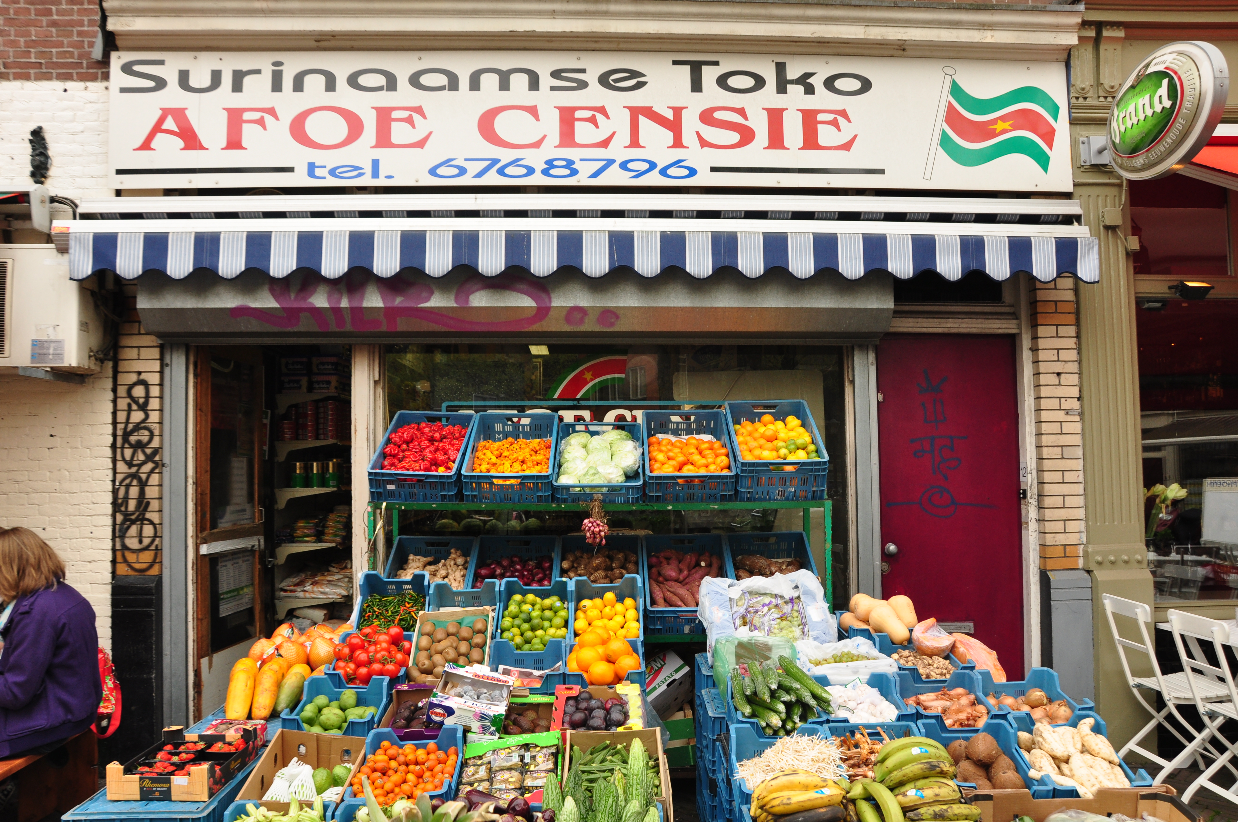 (Verdwenen) Surinaamse Toko Afoe Censie, Gerard Douplein 12, 1072 VE Amsterdam (2011)